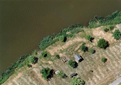 Szepetnek, Hungary, aerialphotography